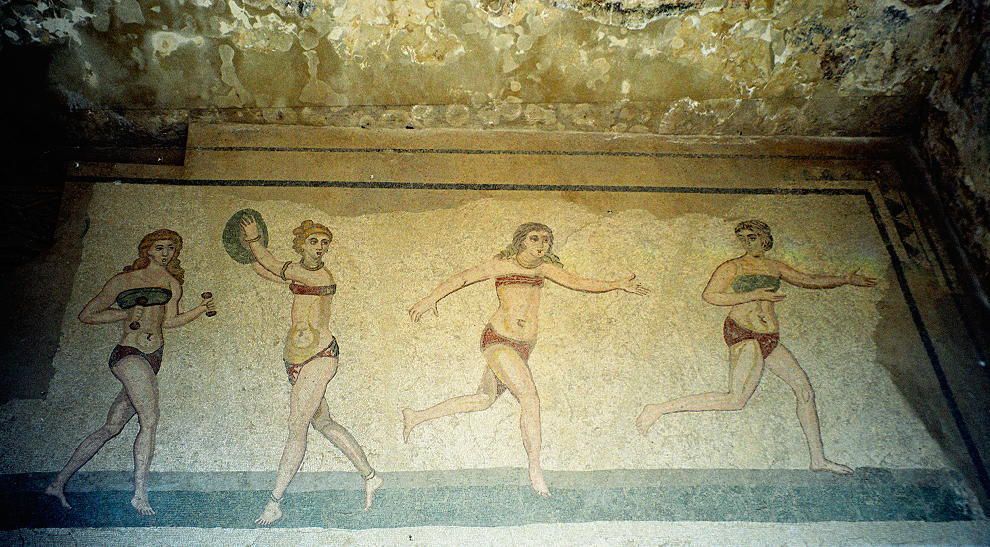 Sicily, Villa Romana del Casale, mozaika "dziewczęta w bikini" - fragment